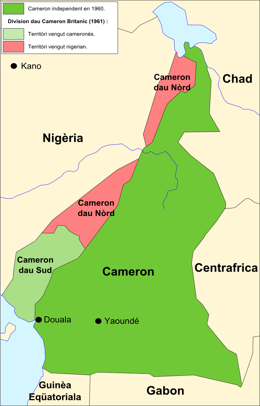 Evolucion territòriala de Cameron durant lo procès d'independéncia.